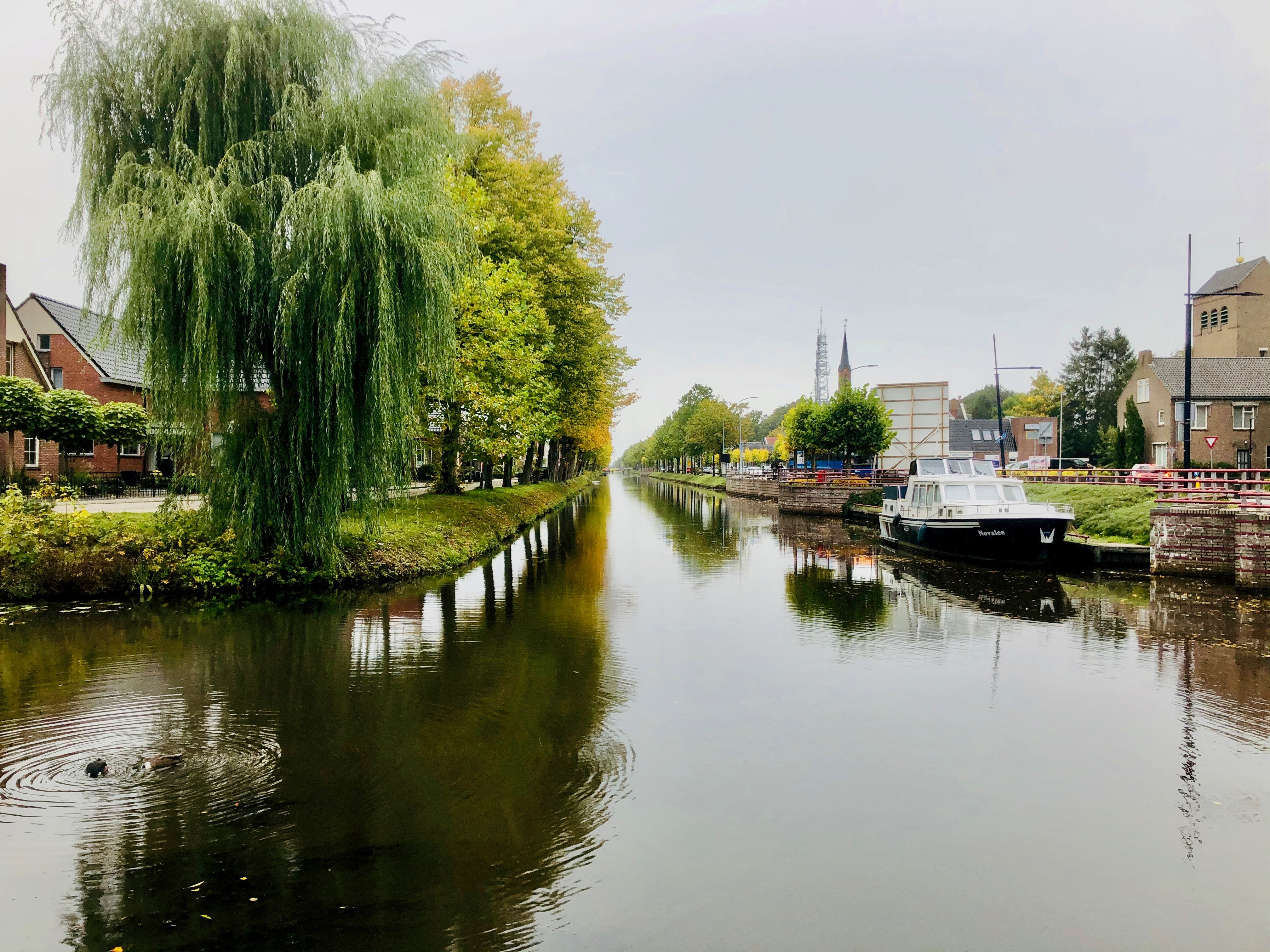 Zicht op het Stadskanaal (gezien vanaf de Drouwenermond)